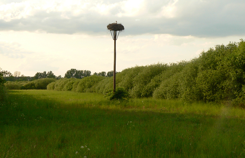 Storchennest im Drömling zw. Röwitz und Buchhorst